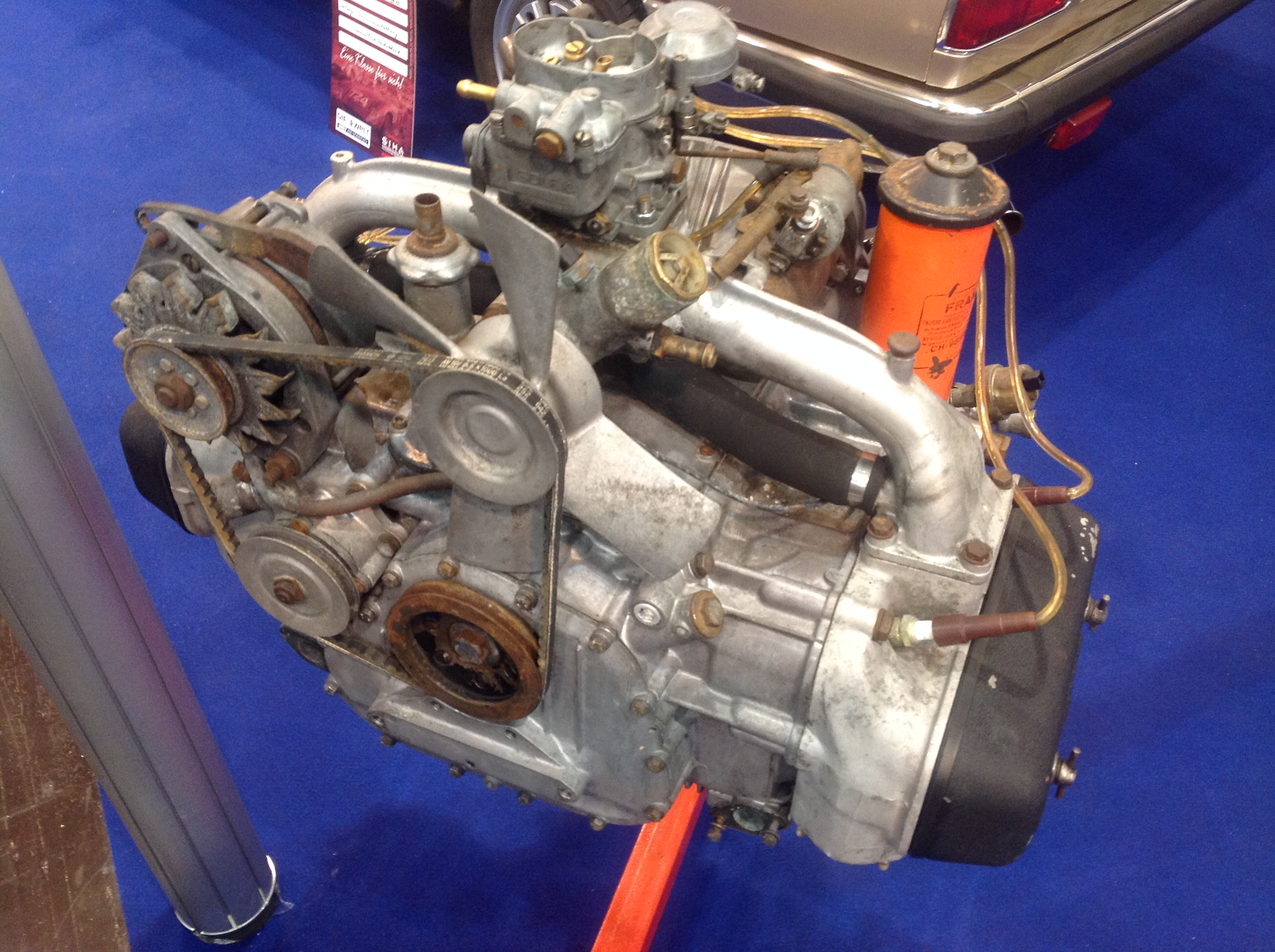 Lancia Flavia Flat four (Boxer) engine